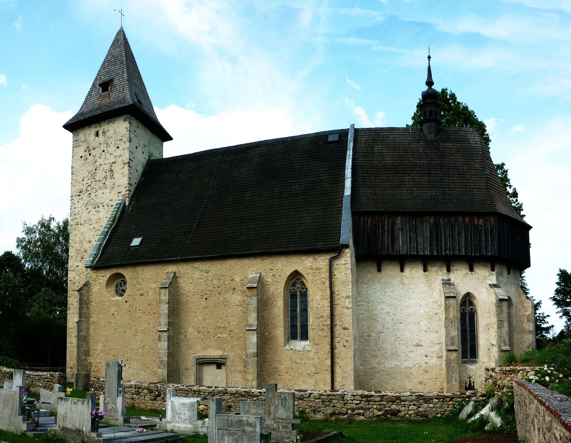 Kostel sv. Linharta v Lidéřovicích